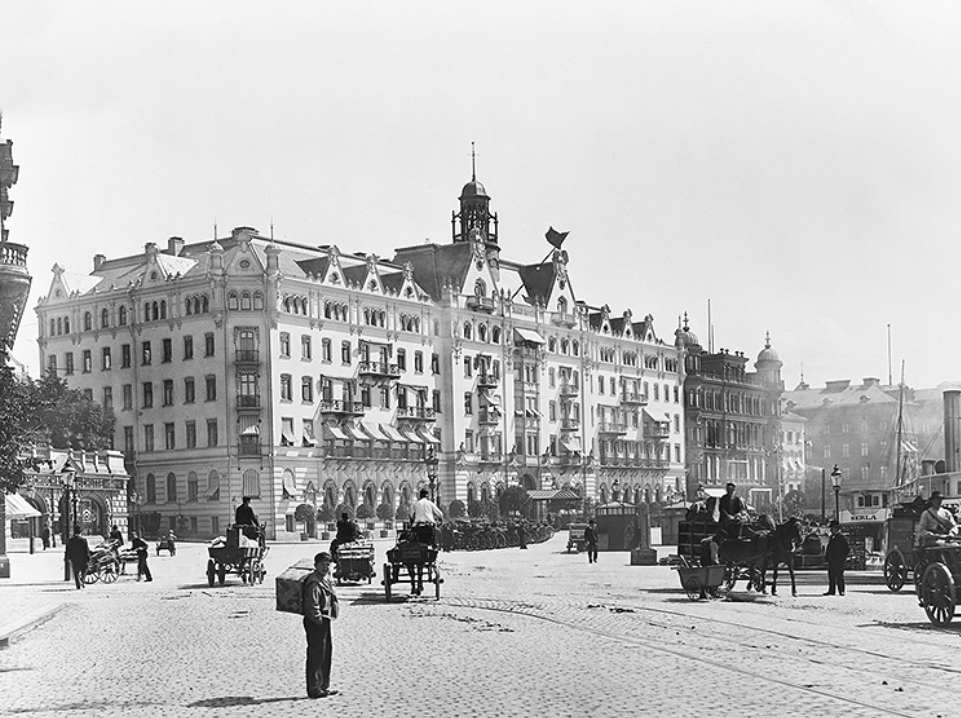 Grand Hotel, Blasieholmen, Stockholm 1901. Motorfordon vid denna tid är sällsynta. Alla tyngre transporter sker med häst och vagn eller med enkla dragkärror.